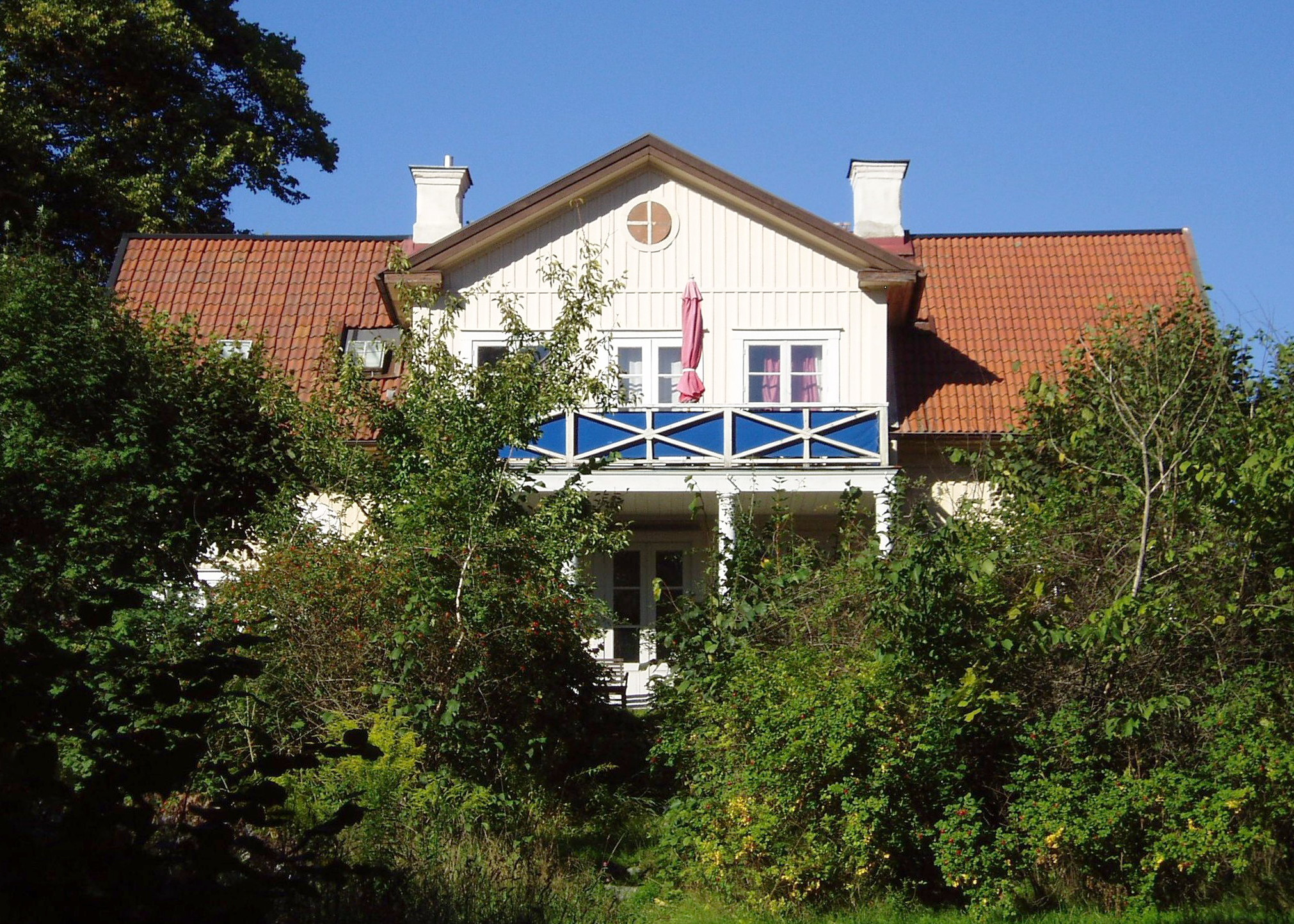 Övre Karlsro, eller Carl Malmstens hus, Bergshamra, Solna kommun